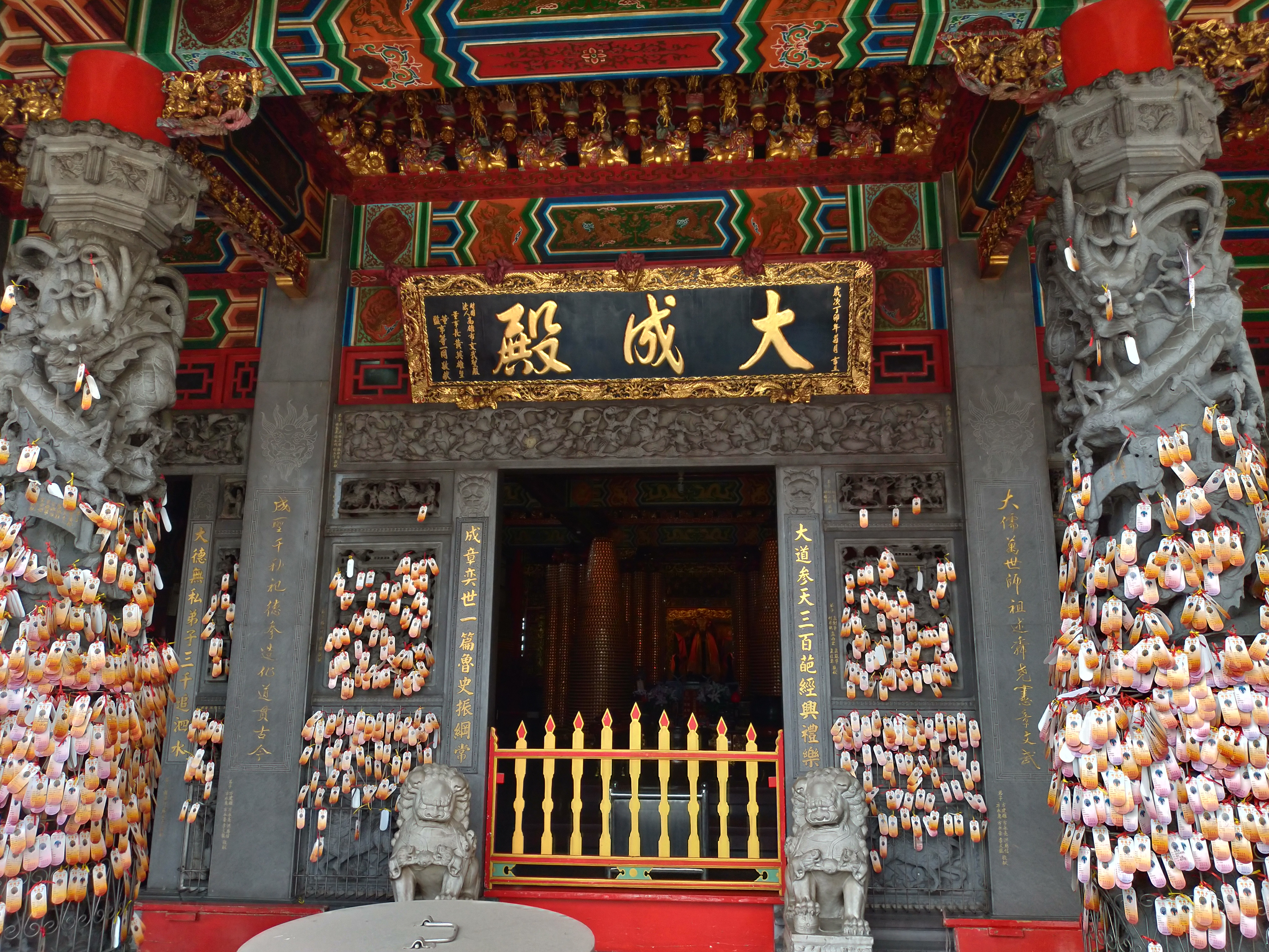 中文（台灣）: 文武聖殿大成殿廟匾；使用本圖片請遵循(CC 姓名標示-非商業性-禁止改作)，Please follow (CC BY-NC-ND 3.0 TW)